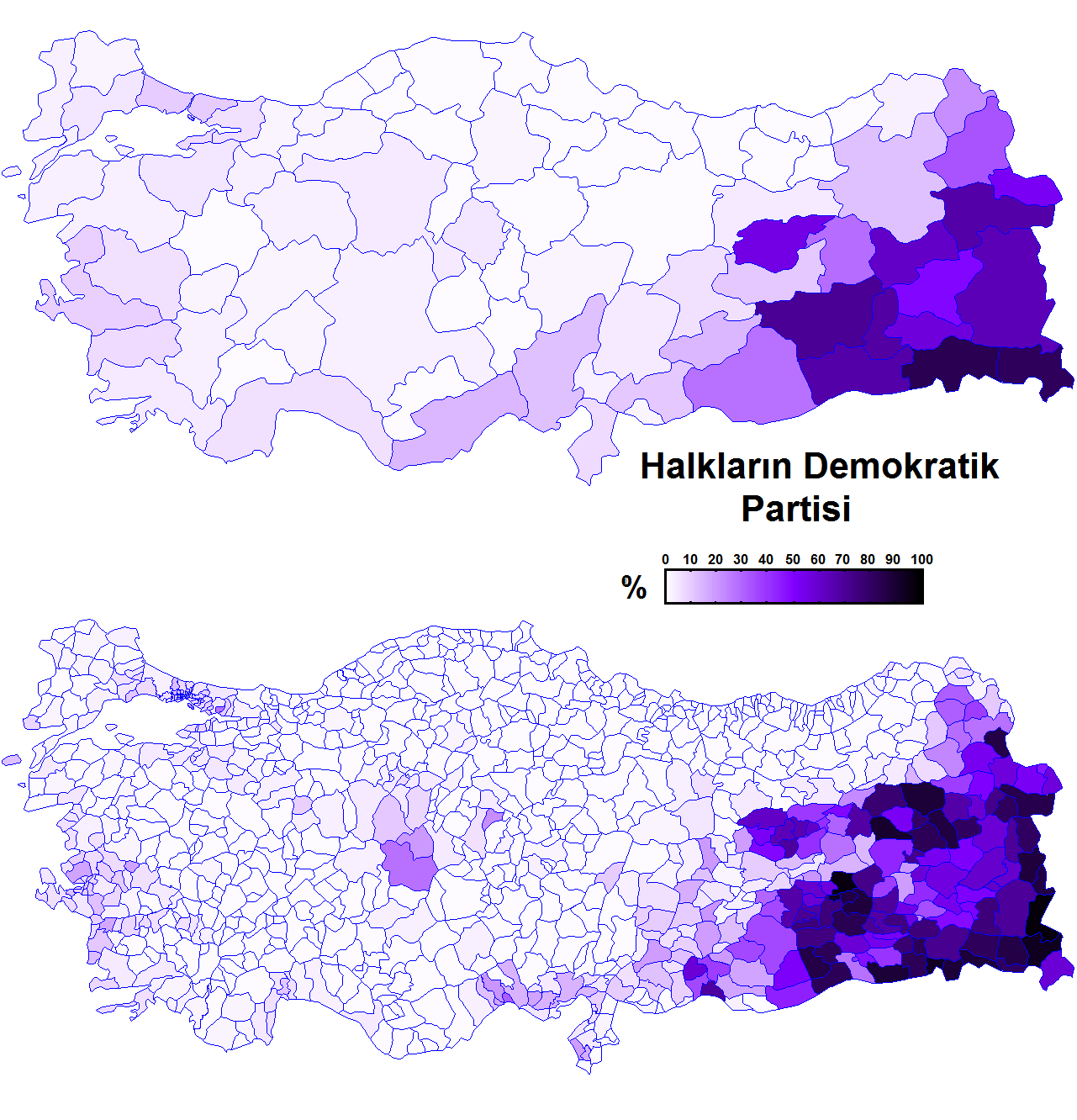 Halkların Demokratik Partisi'nin il ve ilçe bazında oy oranlarının yoğunluğunu gösteren harita